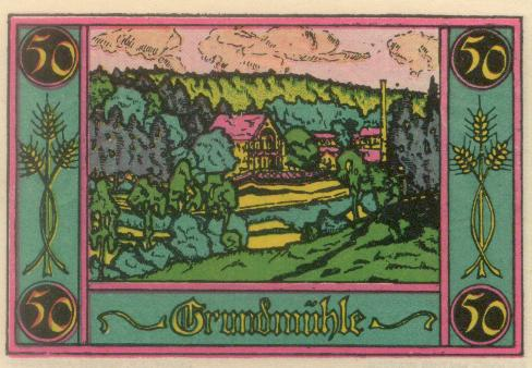 Notgeld aus Marktschorgast: 50 Pfennig von 1921